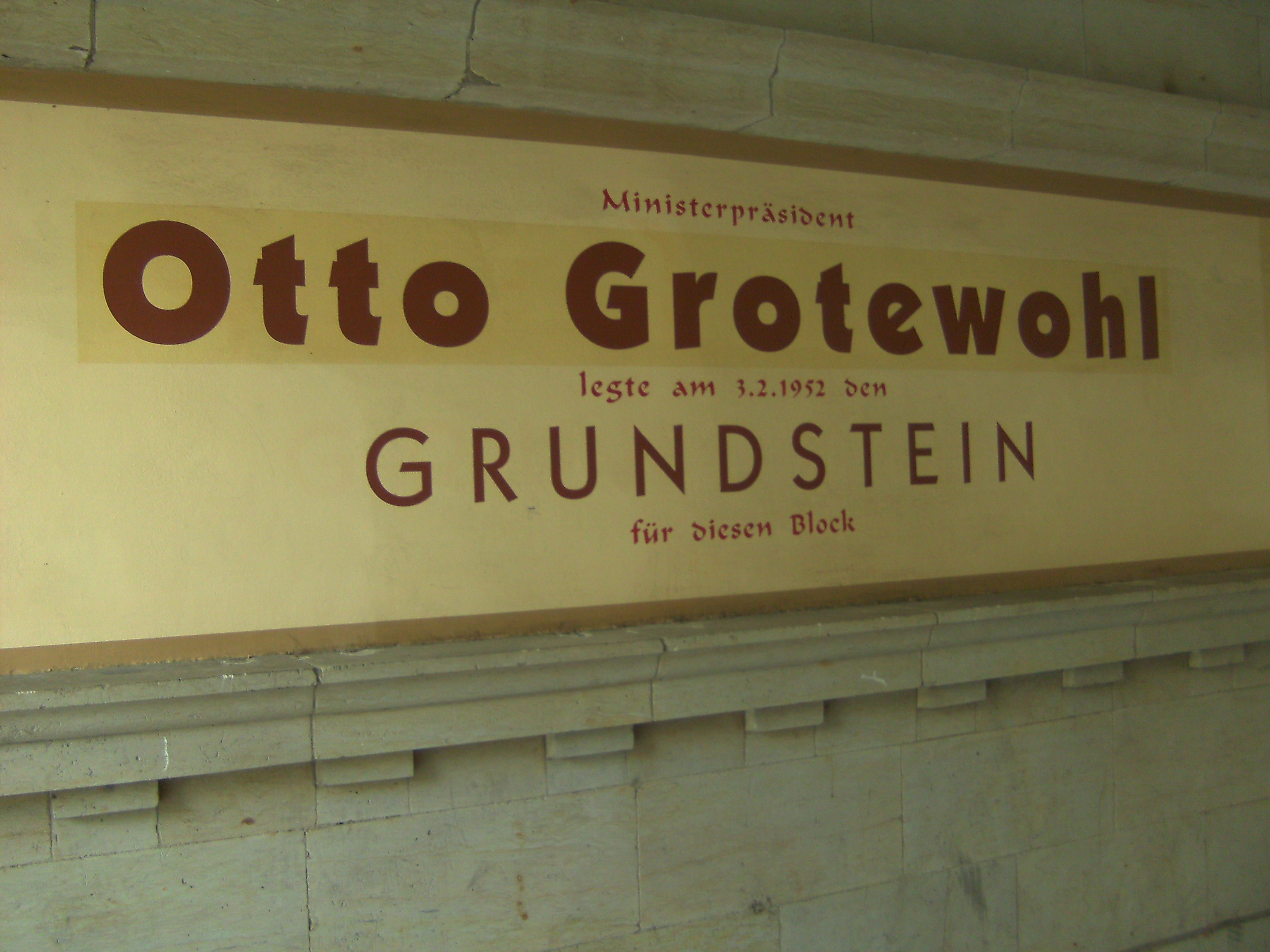 urkundliche Erwähnung über die Errichtung eines Hauses in der Karl-Marx-Allee in Berlin